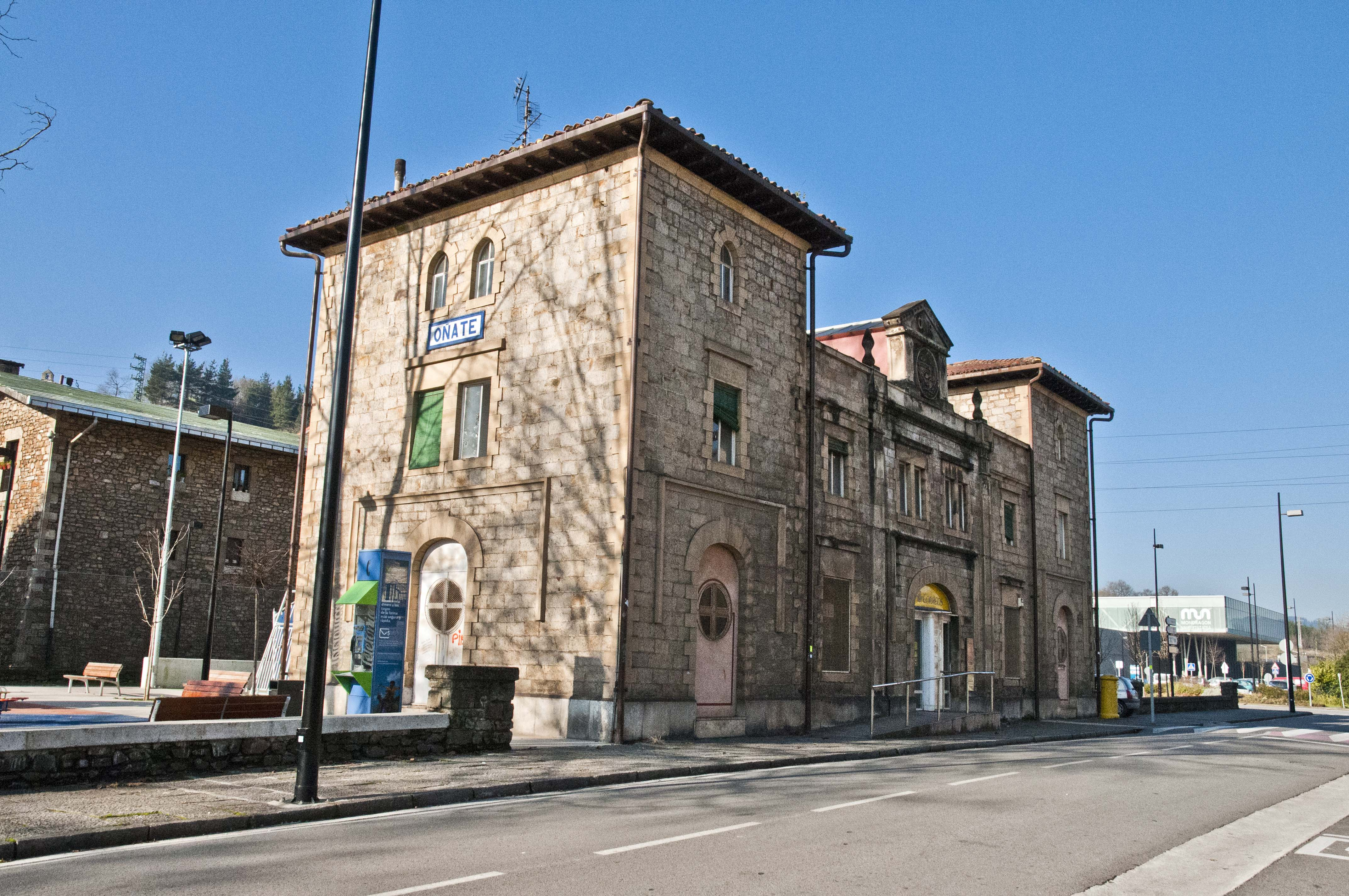 Antigua estación del tren